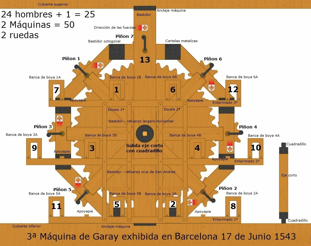 3ª Máquina de Garay 1543 (4)